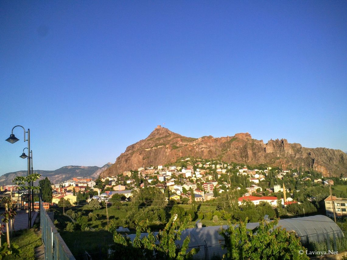 Giresun / Şebinkarahisar'dan bir görünüm. Haziran 2012